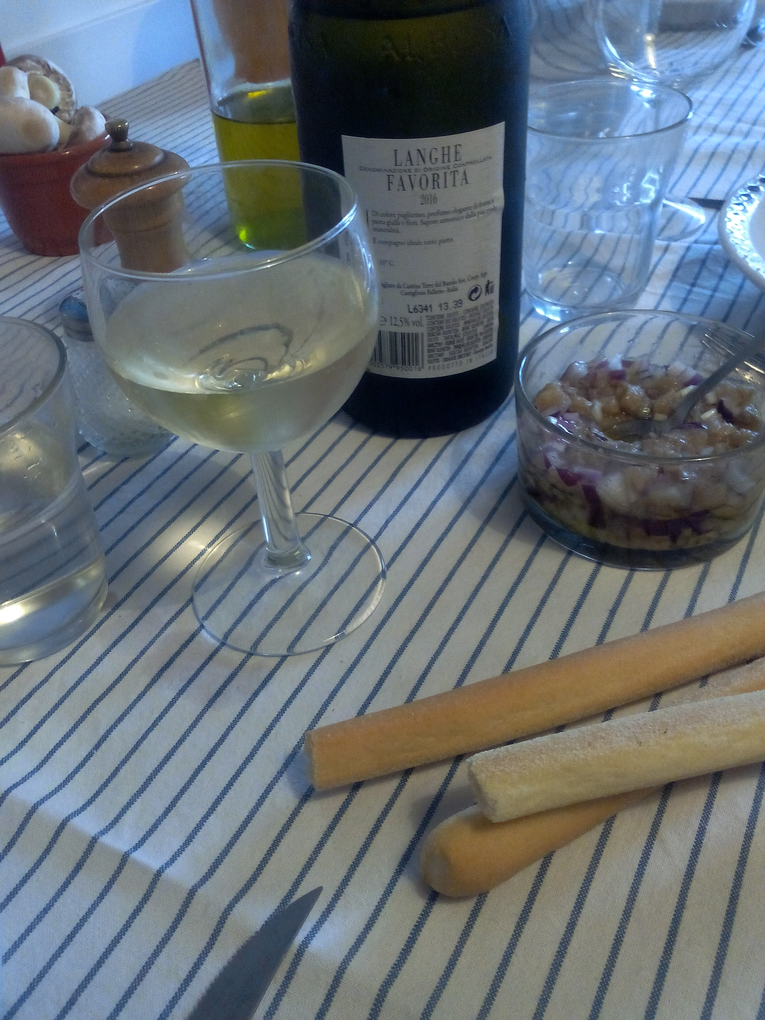 Favorita delle Langhe doc 2016